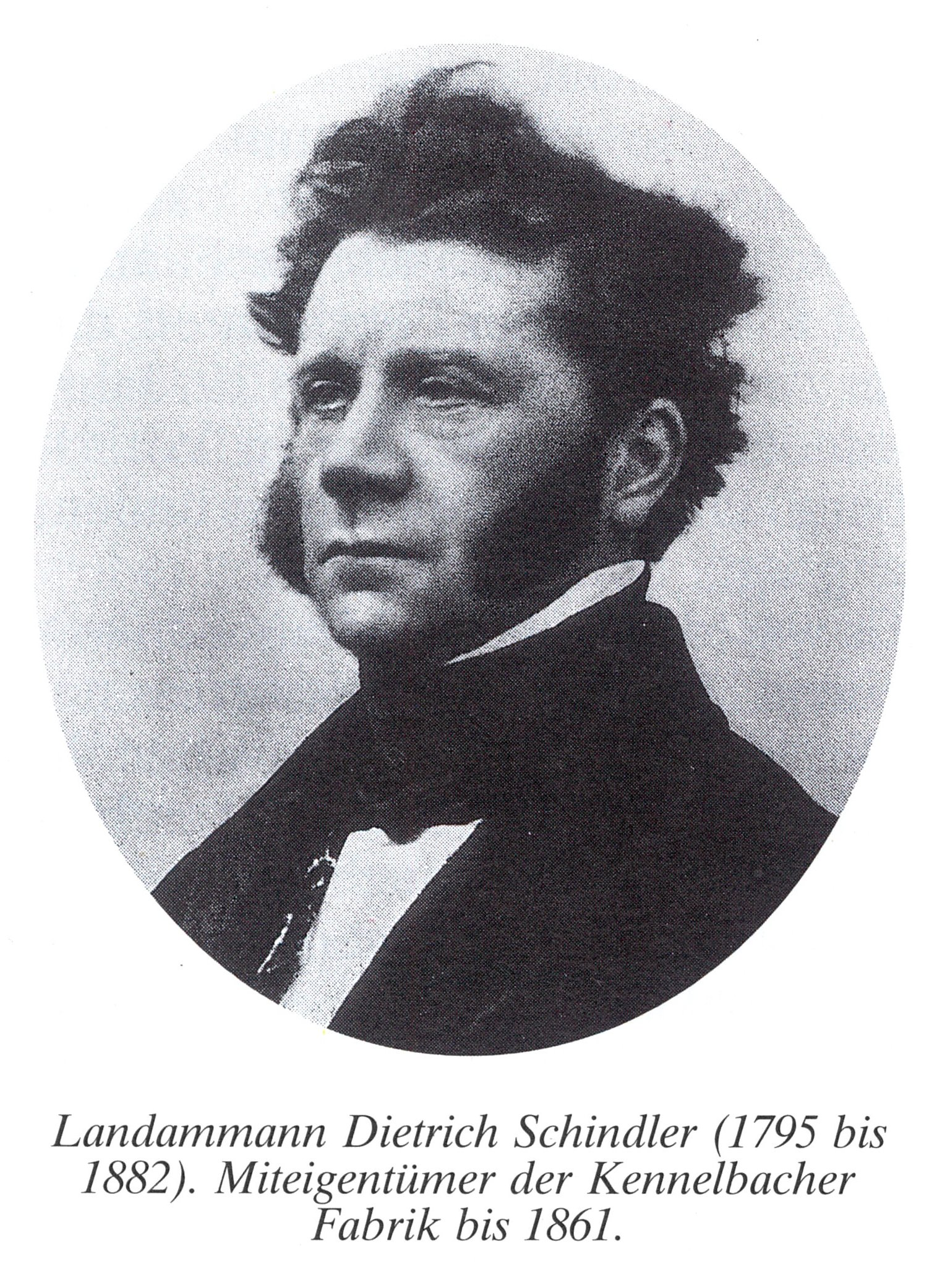 Dietrich Schindler, geboren am 14. Dezember 1795 in Mollis, Schweiz; gestorben 1882 in Zürich, Schweiz) war ein Schweizer Staatsmann, Unternehmer und Kunstsammler. Als stiller Teilhaber der Textilfabrik «Jenny und Schindler» in Kennelbach und Hard führte er das Leben eines Privatiers. Außerdem war er der Neffe von Friedrich Wilhelm Schindler.